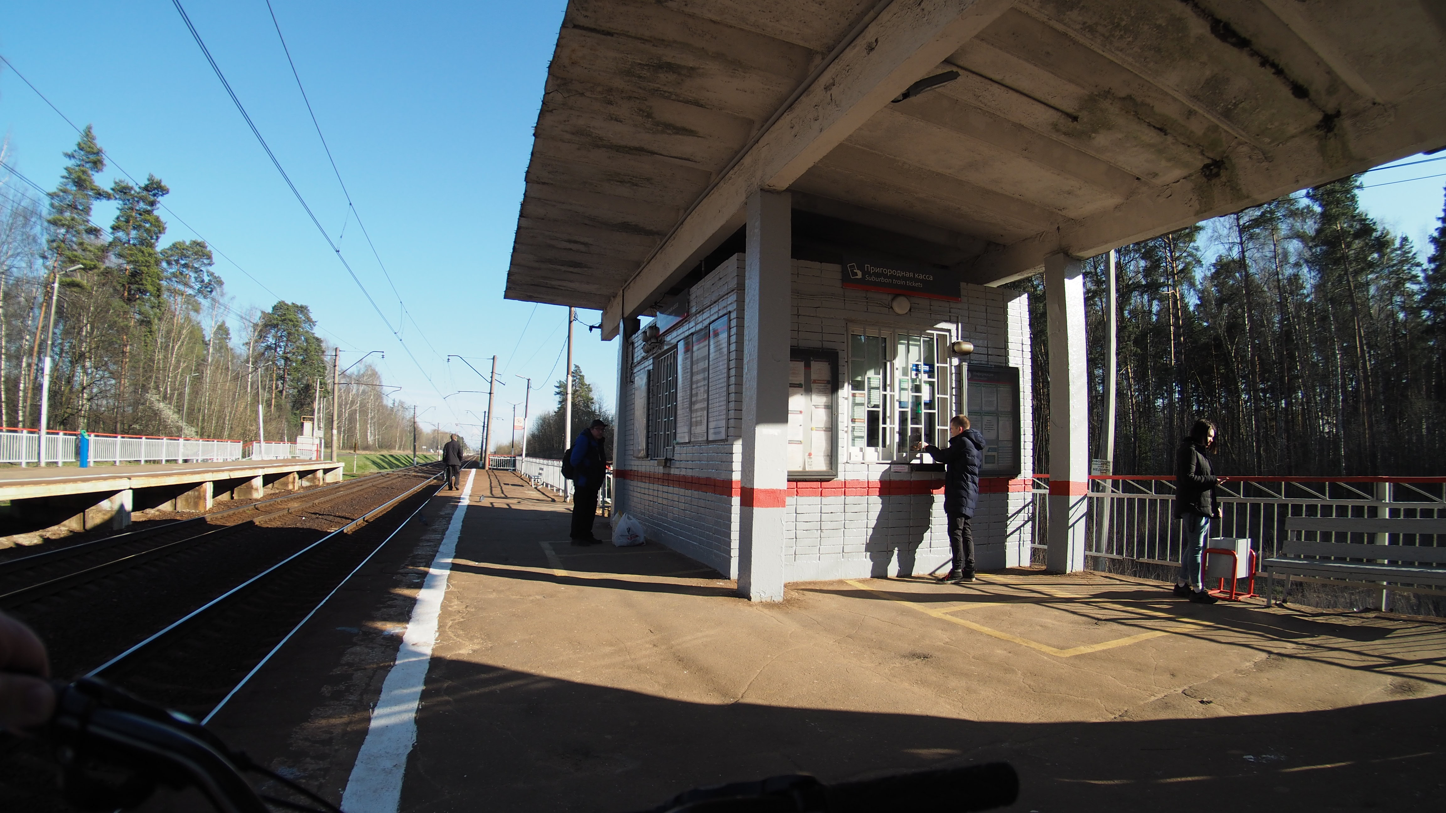 платформа Загорново